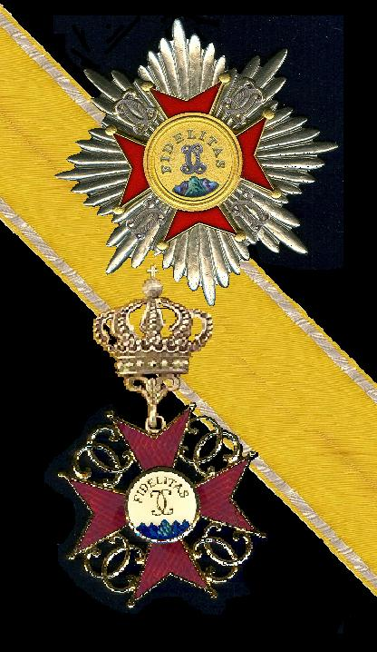 Scan van kruis en ster uit mijn verzameling. Het lint is getekend maar komt precies overeen met het origineel.